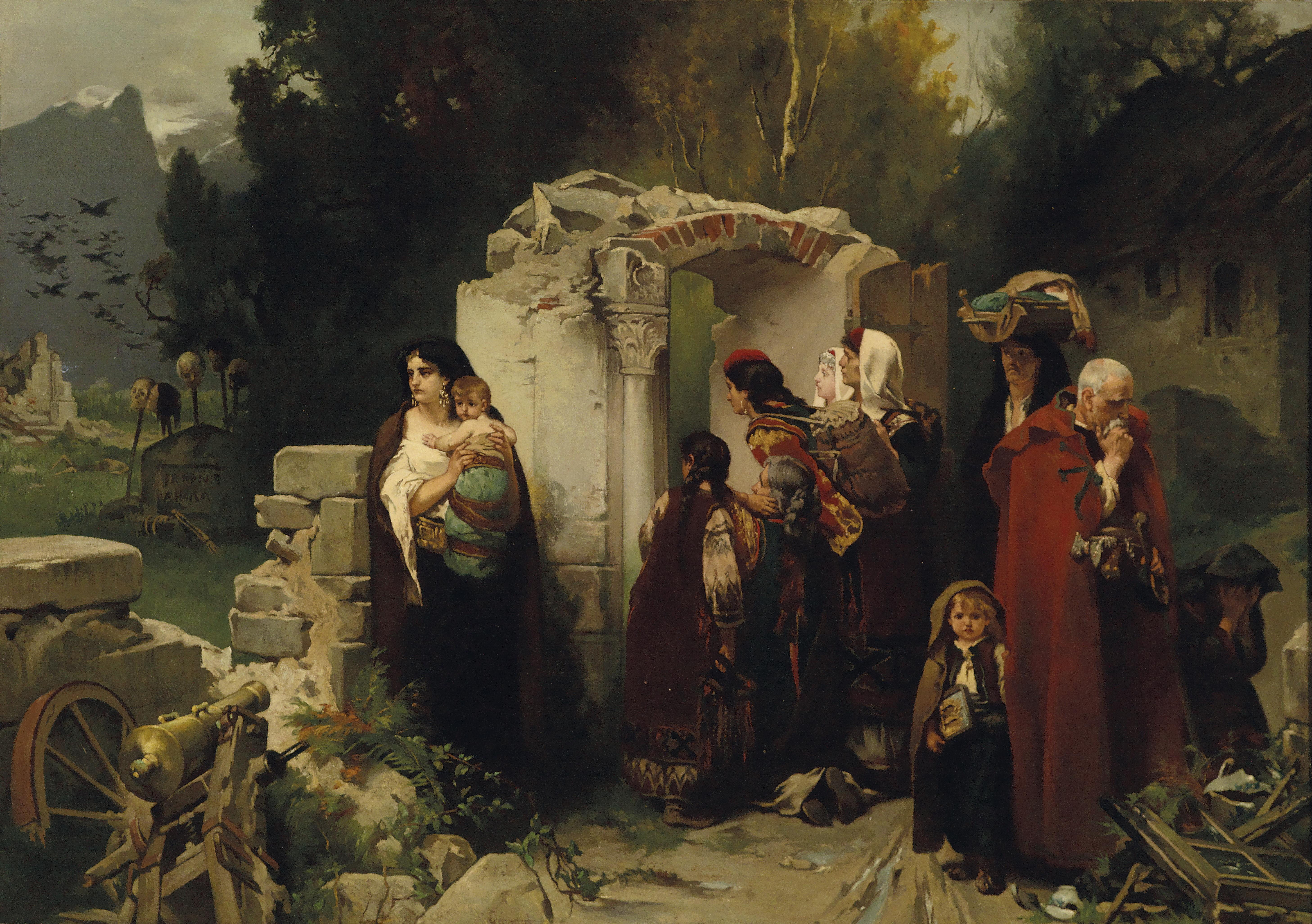 Die Rückkehr montenegrinischer Flüchtlinge in ihr heimatliches Dorf, 1877, signiert Cermak, Öl auf Leinwand, 133,5 x 189 cm